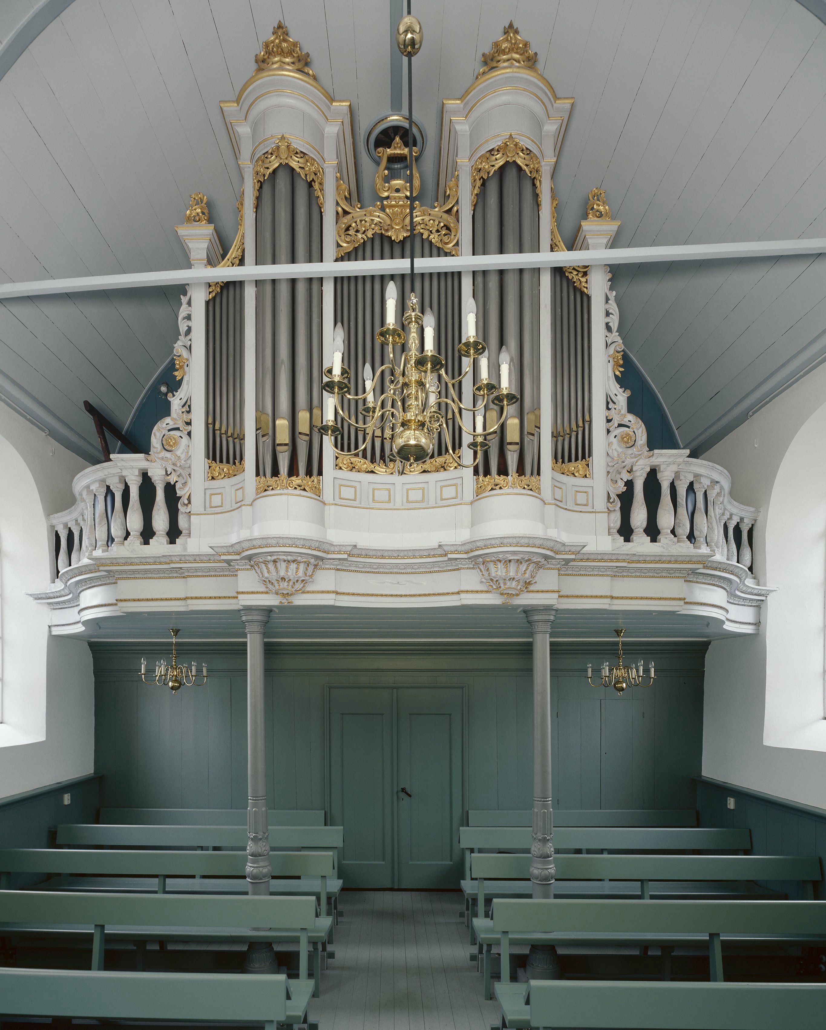 Nederlands Hervormde Kerk: Interieur, aanzicht orgel, orgelnummer 1214 (opmerking: Gefotografeerd voor Het Historische Orgel in Nederland 1878-1886, Bladzijde 129)